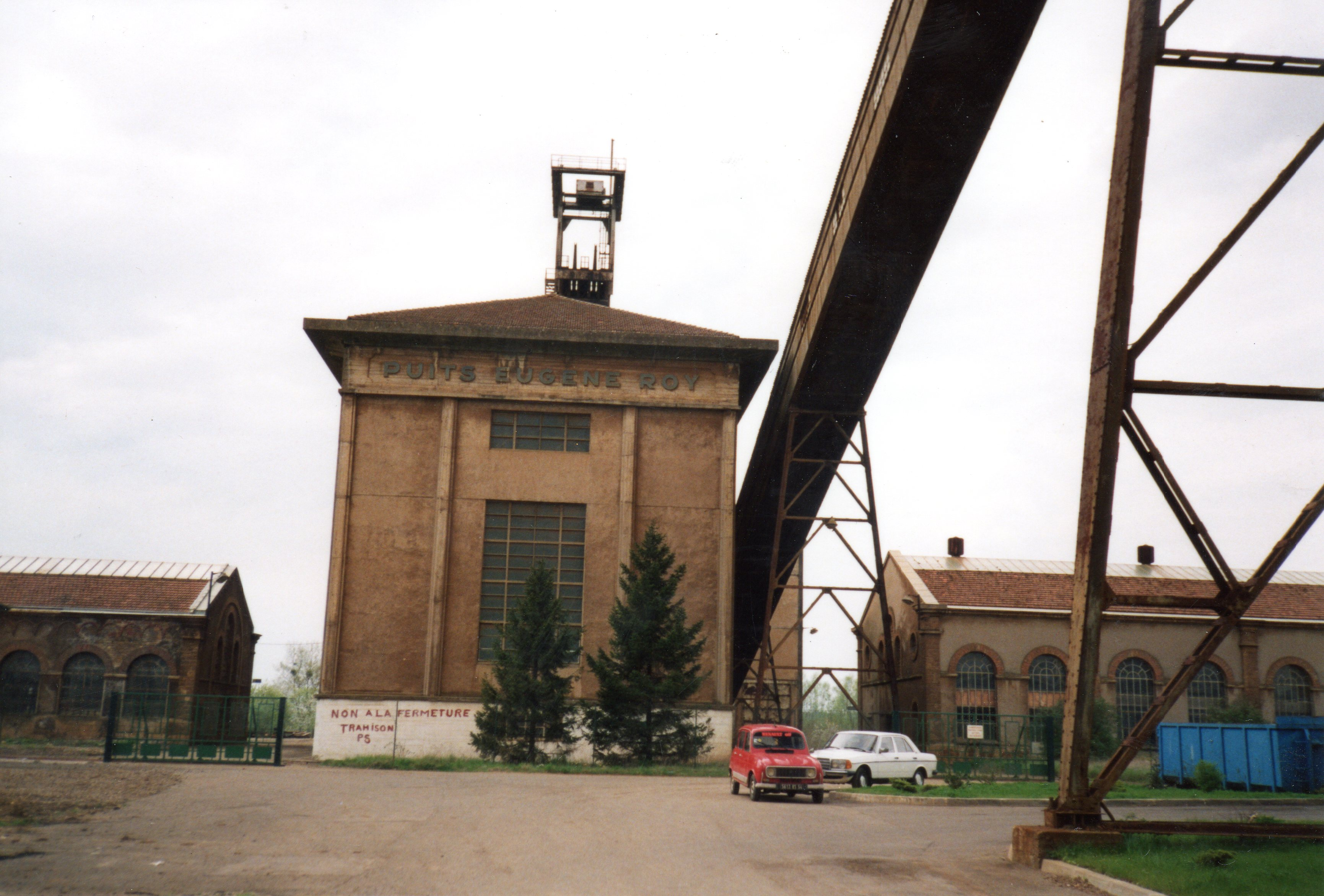 Vue du puit Eugène Roy de la mine de Tucquegnieux